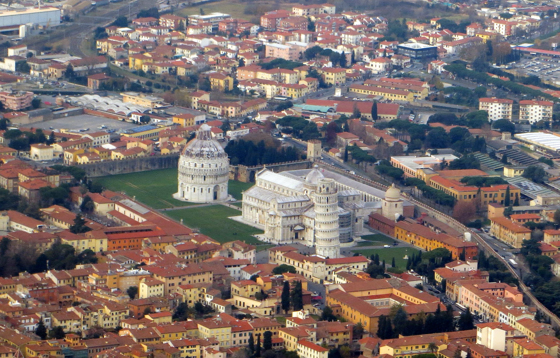 Piazza dei Miracoli vista dall'alto